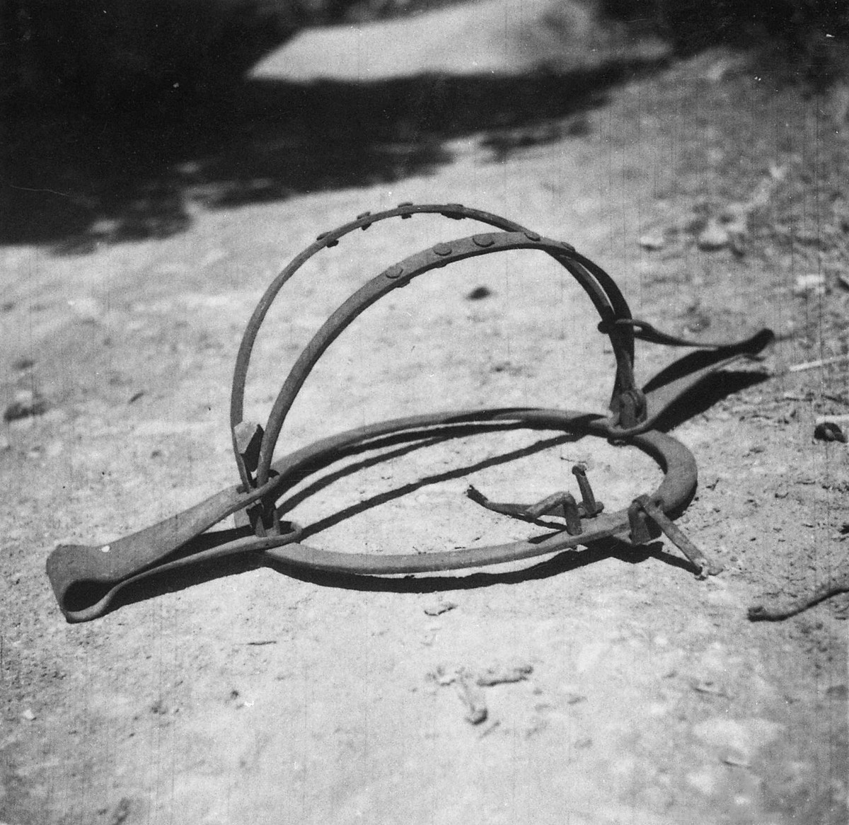 "Skobec" za jazbeca lovit, Erzelj.